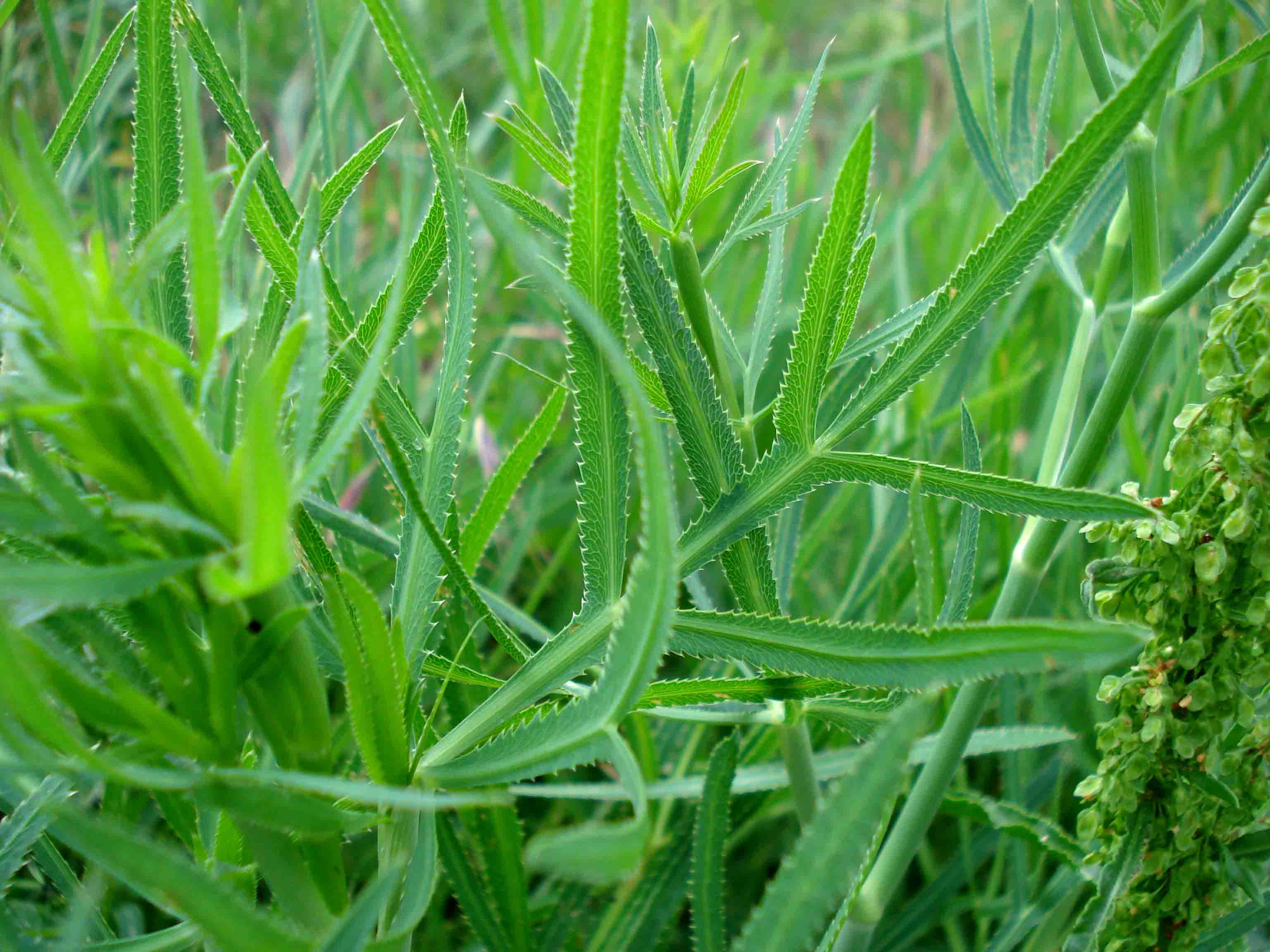 Falcaria vulgaris (Unterfranken, Germany)